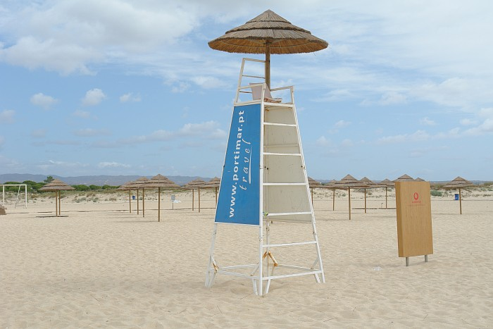 Ilha de Tavira in Ria Formosa, Portugal. Photography: Osvaldo Gago